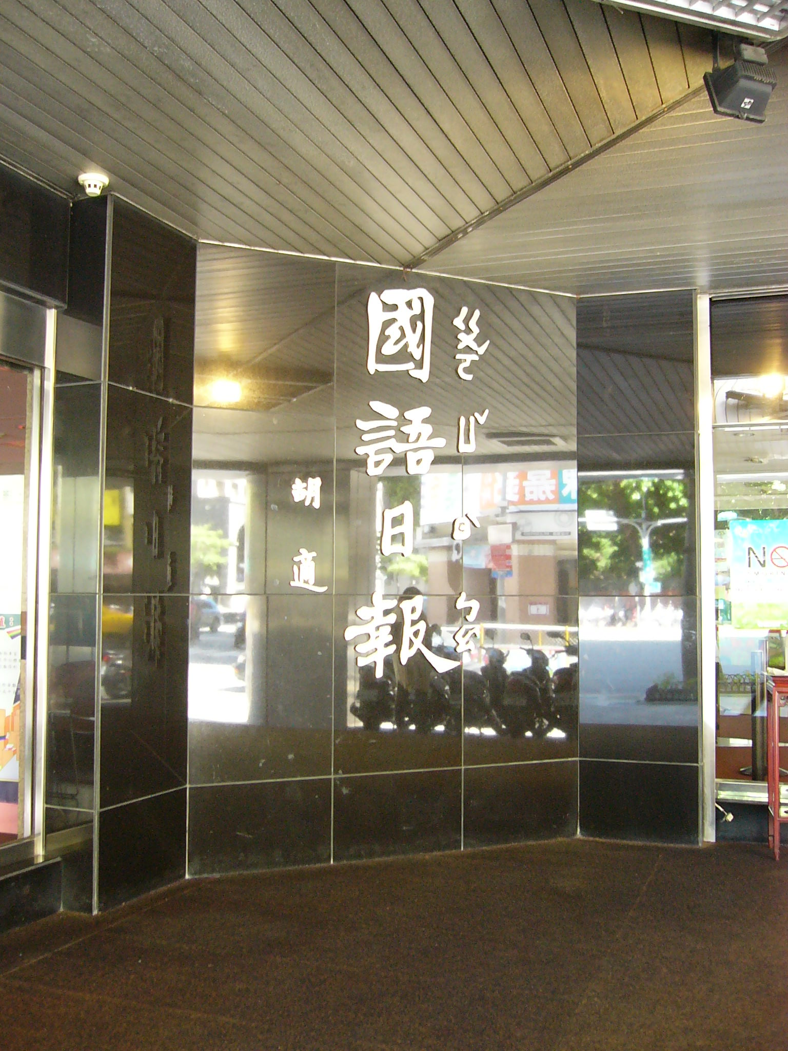 胡適題字的《國語日報》報頭。